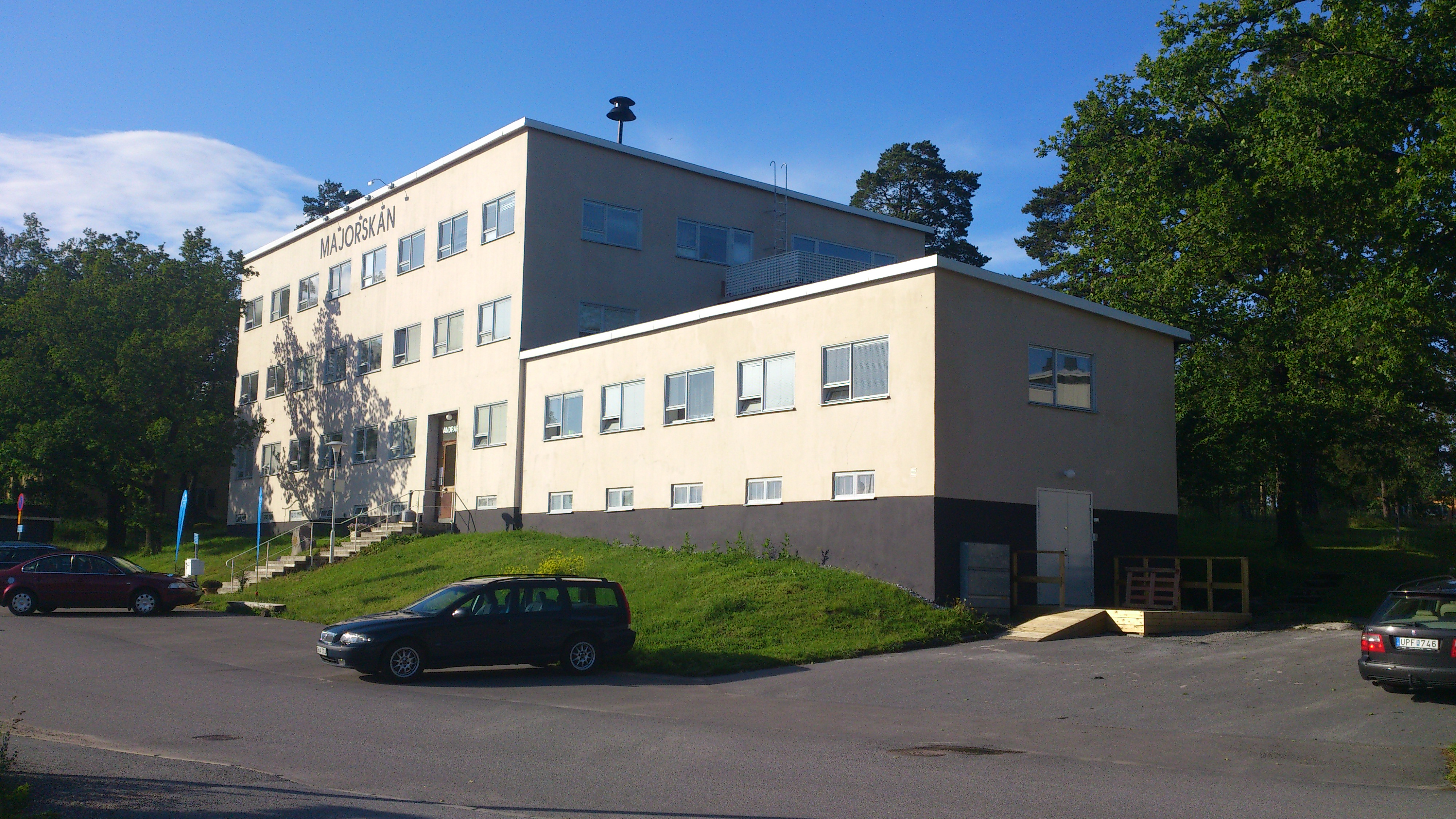 Före detta kanslihuset vid Svea flygflottilj eller även känt som F 8 Barkarby. Sedan slutet av 1990-talet är byggnaden hem åt vandrarhemmet Majorskan.